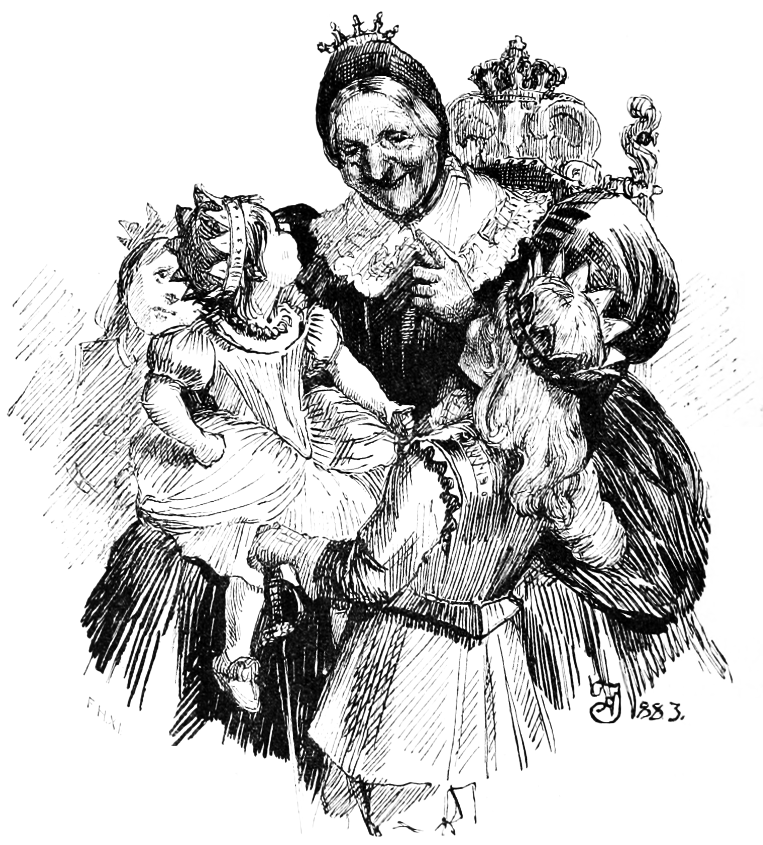 Illustration fra Danske Folkeæventyr ved Svend Grundtvig.